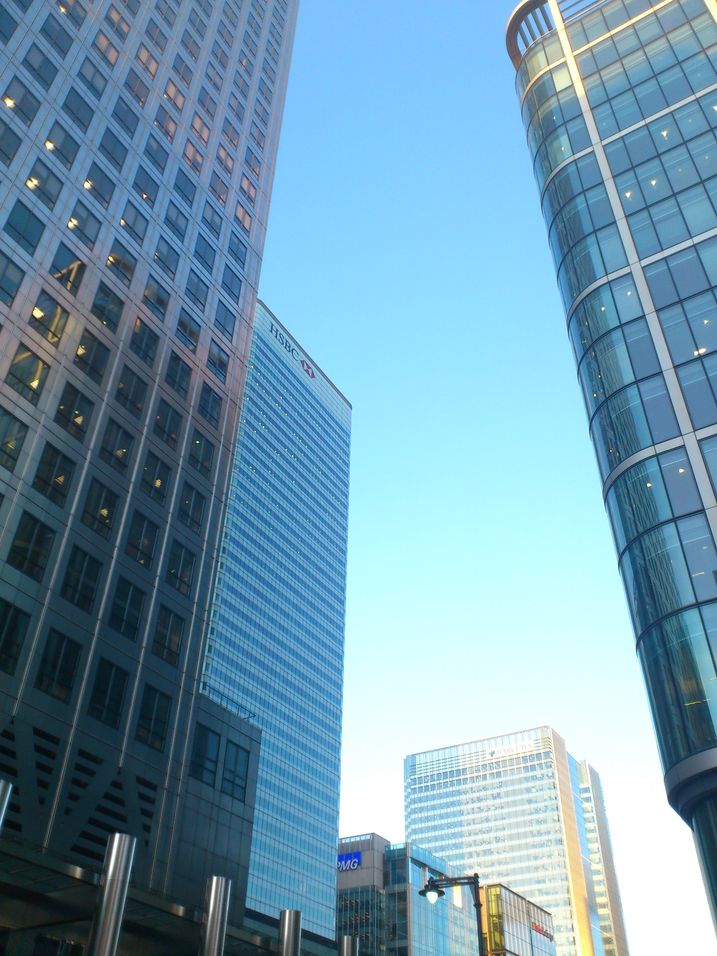 Canary Wharf en Octubre 2011